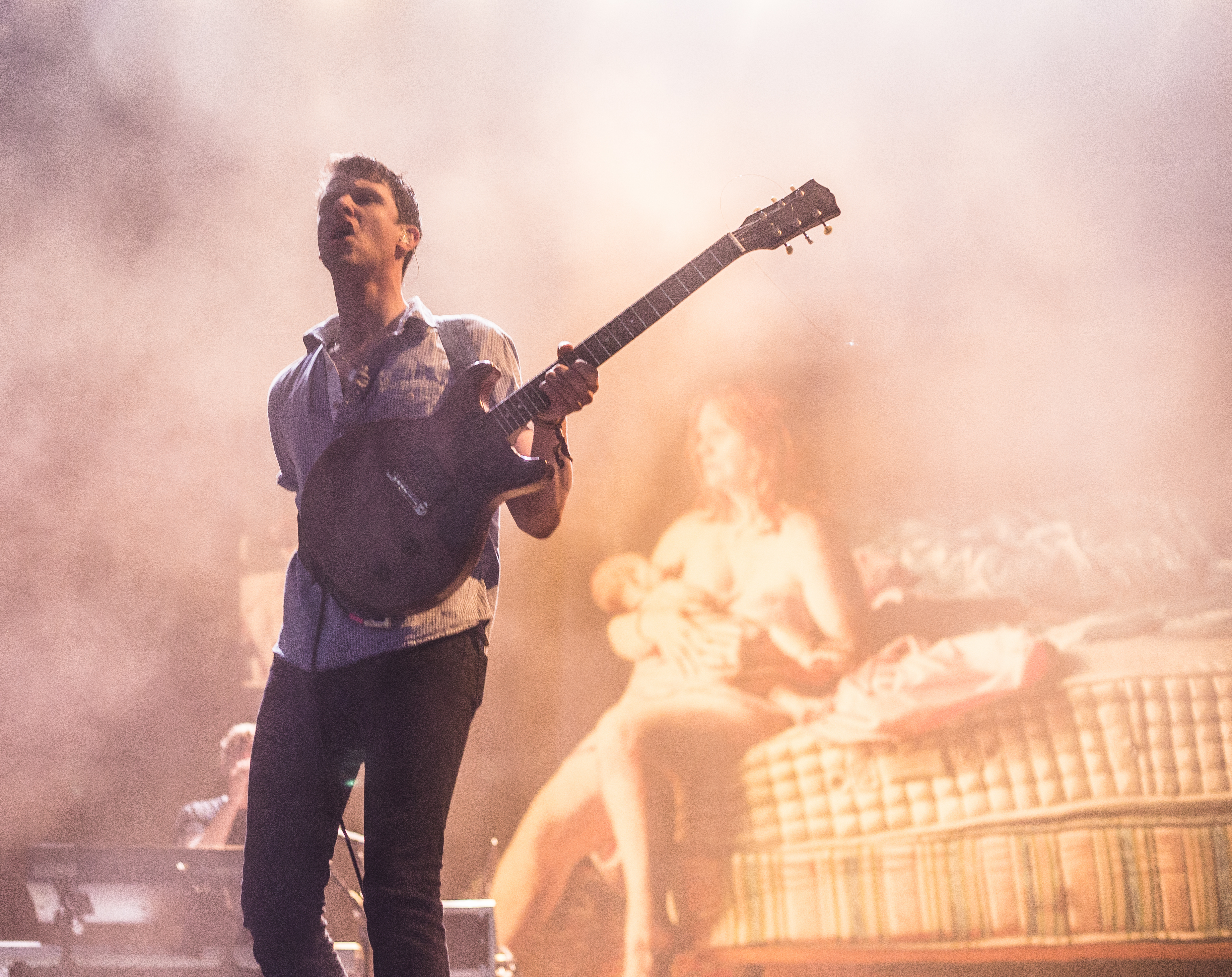 FIB 2015